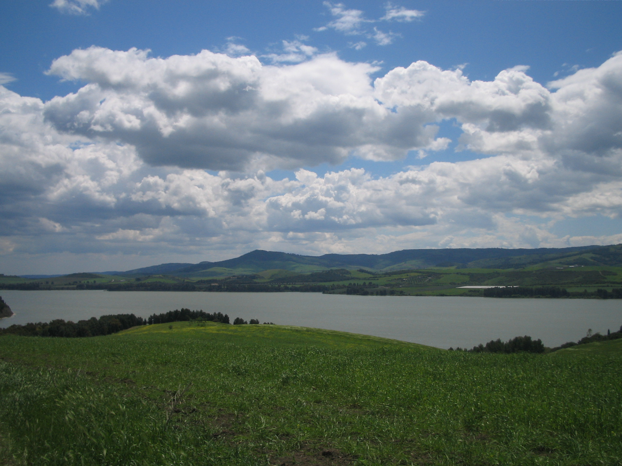 Lago di San Giuliano